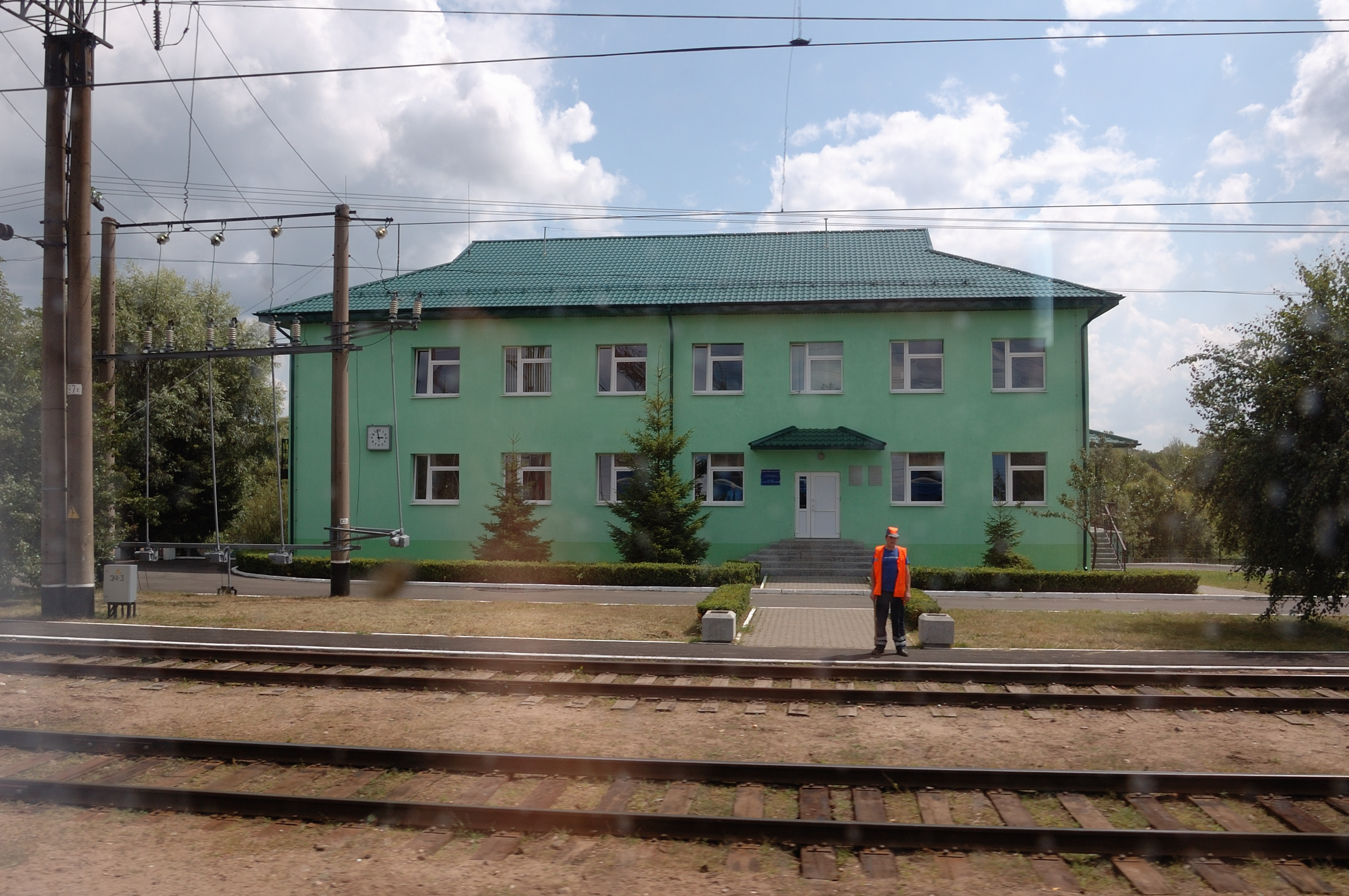 Отделение паспортного контроля "Буг" имени Кублашвили